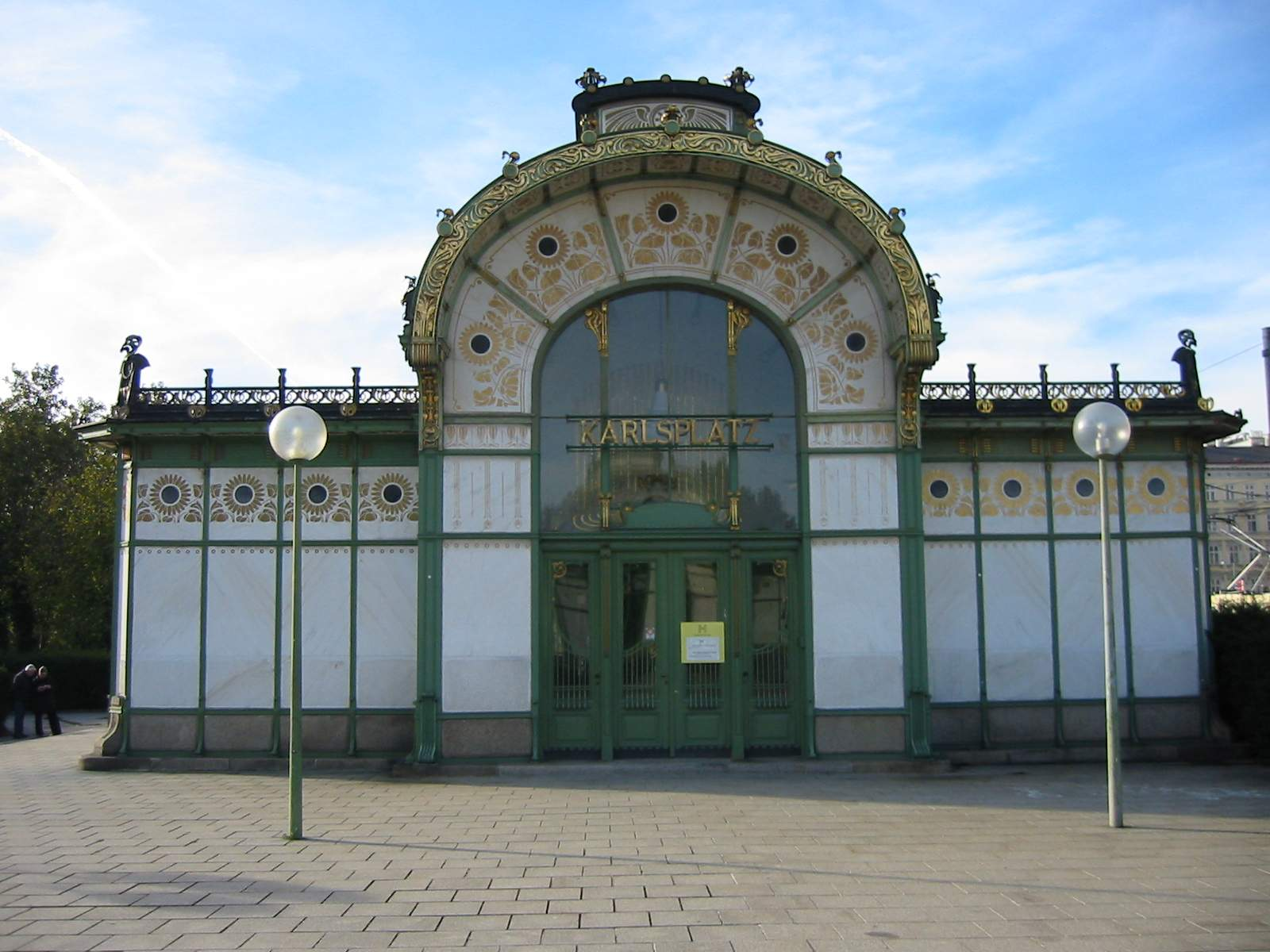 Foto gemacht und zur Verfügung gestellt von Fantasy :-)